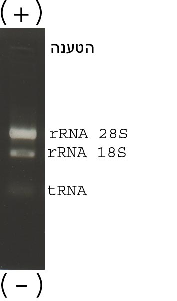 RNA